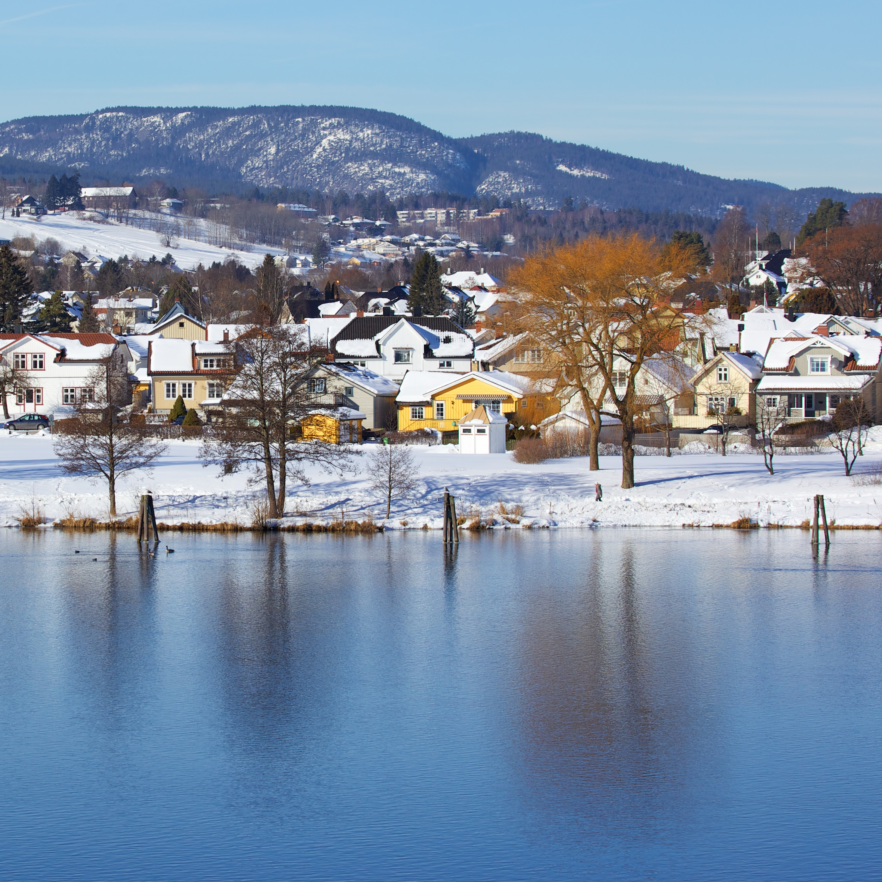 Bakkestranda og Farelva i Skien, sett fra Herkules. View Large On Black